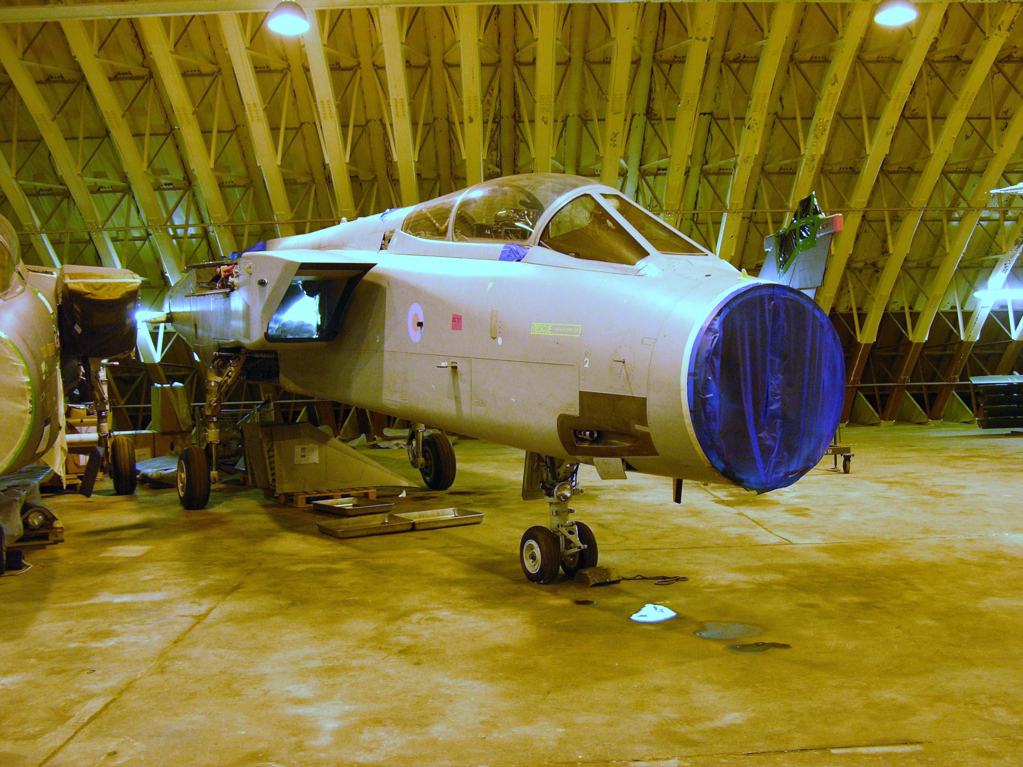 Looks like a Tornado F.3